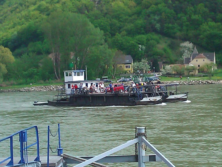 Fähre bei Weißenkirchen an der Donau, Niederösterreich, kurz vor dem Anlegen in Weißenkirchen.